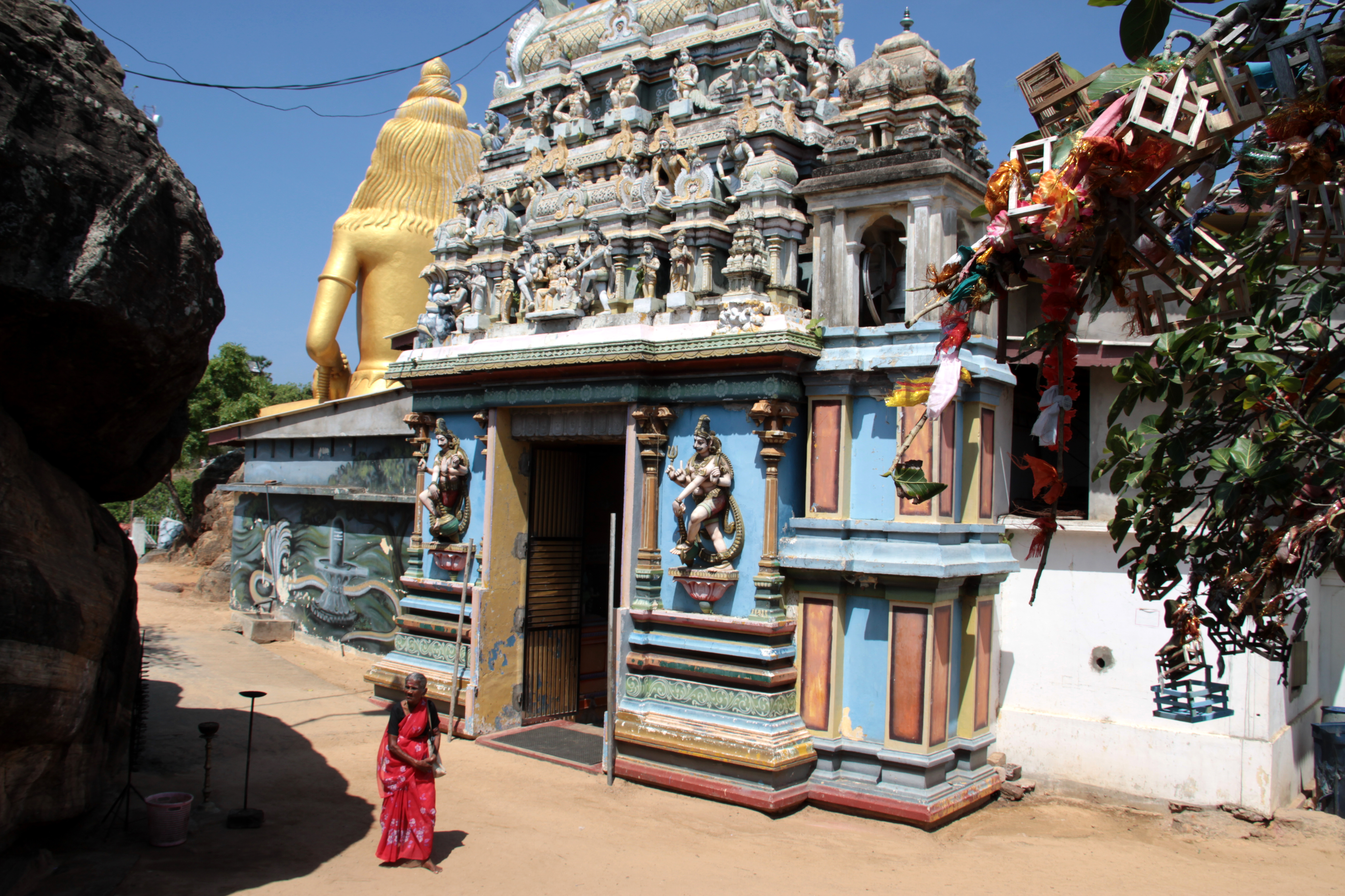 sri lanka, trincomalee, temple hindou